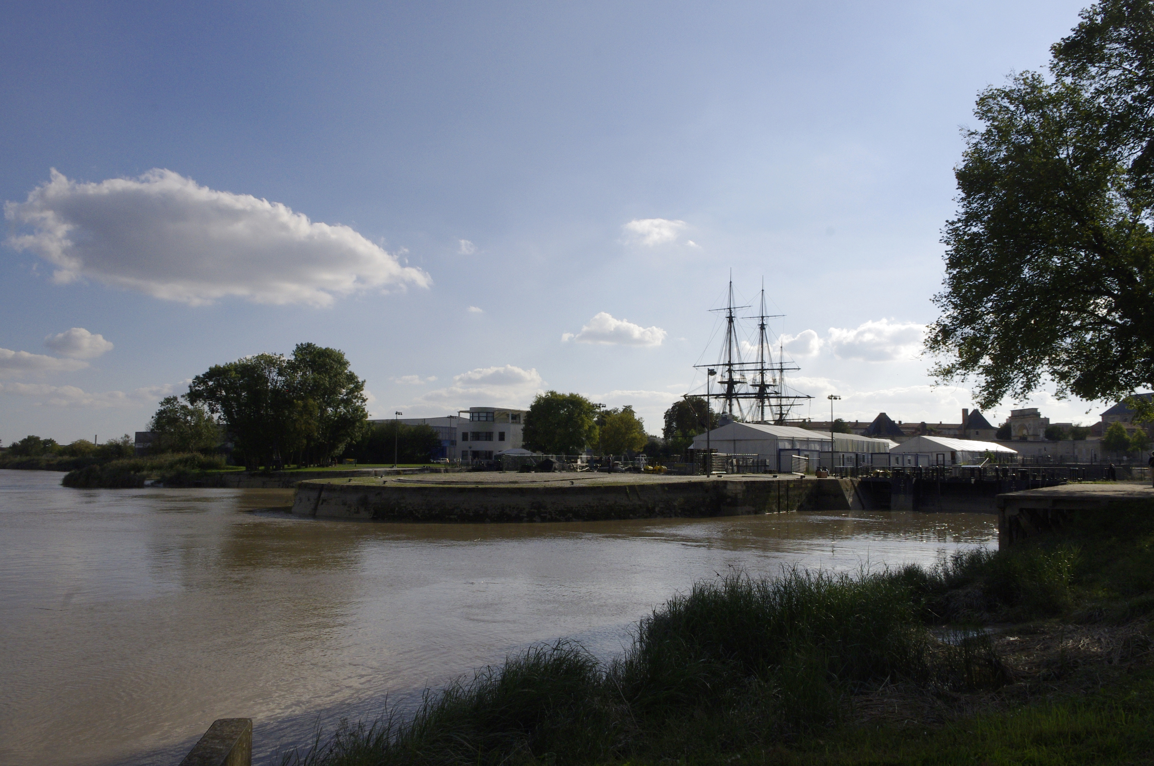 Rochefort - la Charente et le chantier de l'Hermione.